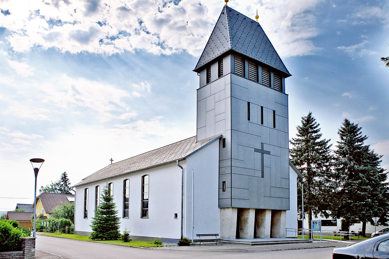 Evang. Pfarrkirche A.B., Gnadenkirche